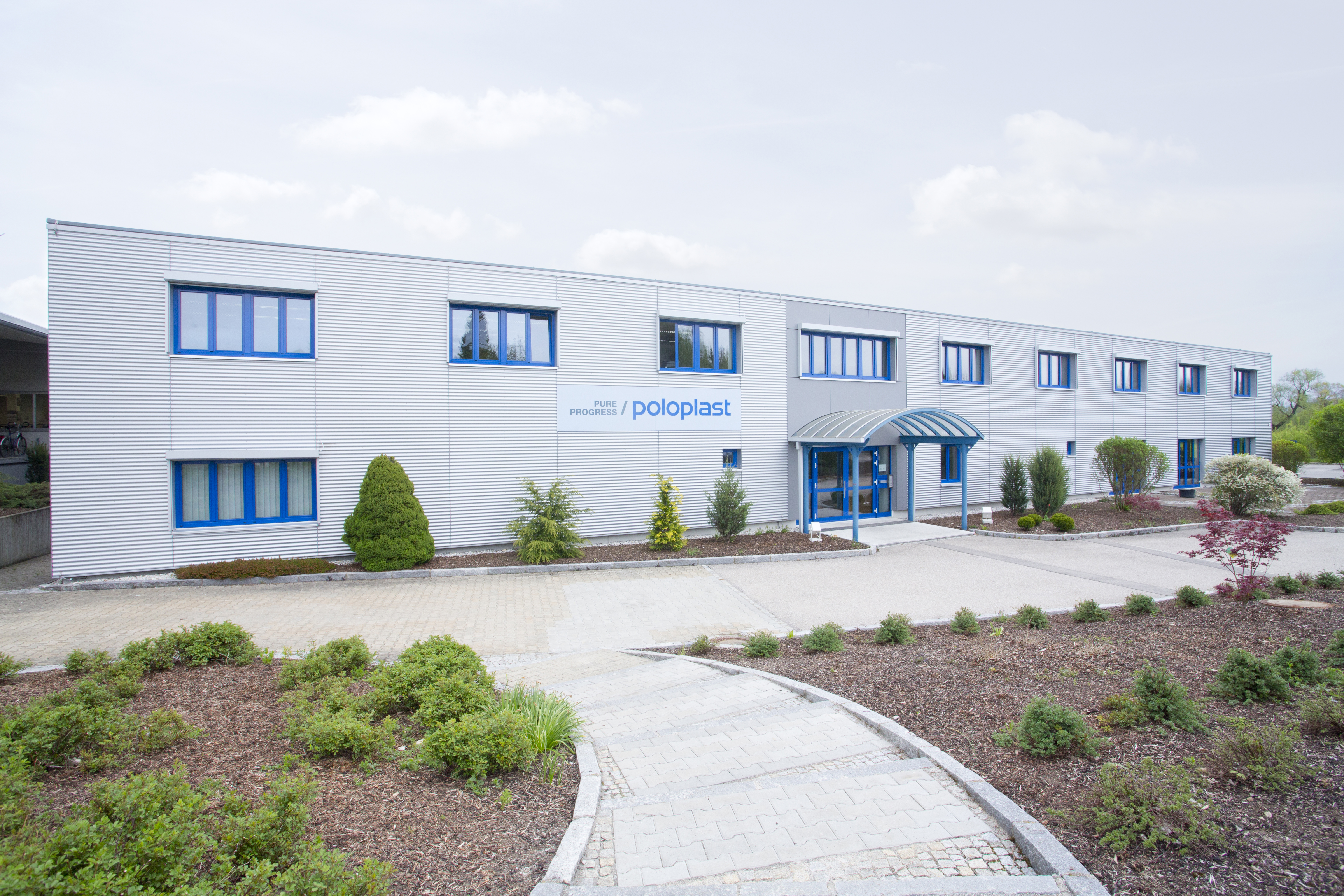 Werk Ebenhofen